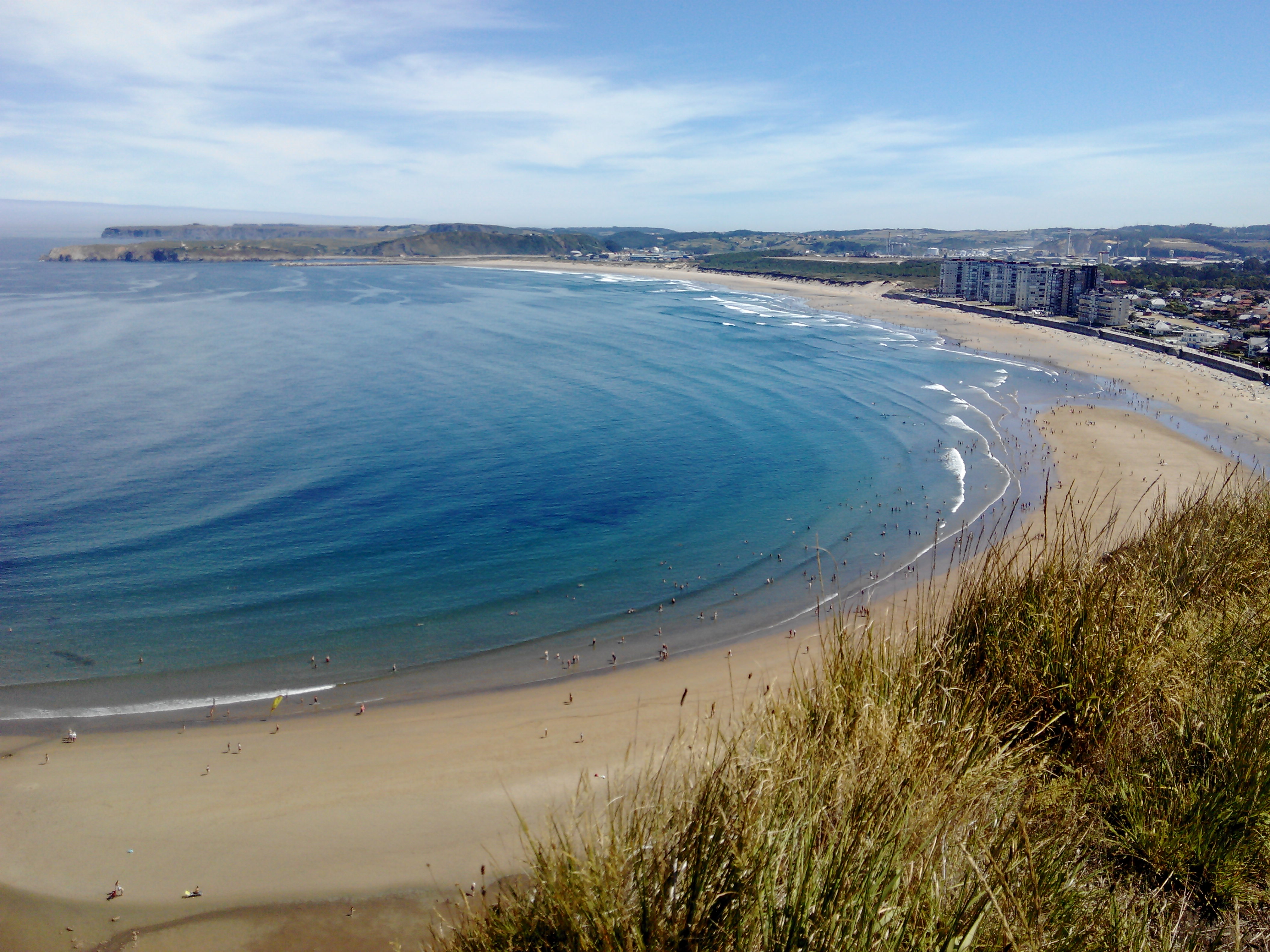 Playa de Salinas desde Pinos Altos This is a photography of a Special Area of Conservation in Spain with the ID: ES1200055. Natura2000 entry, EEA entry